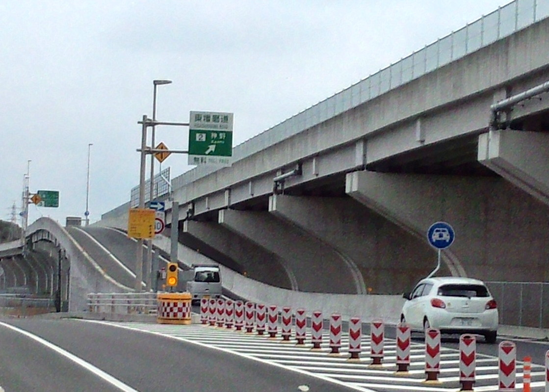 神野ランプ